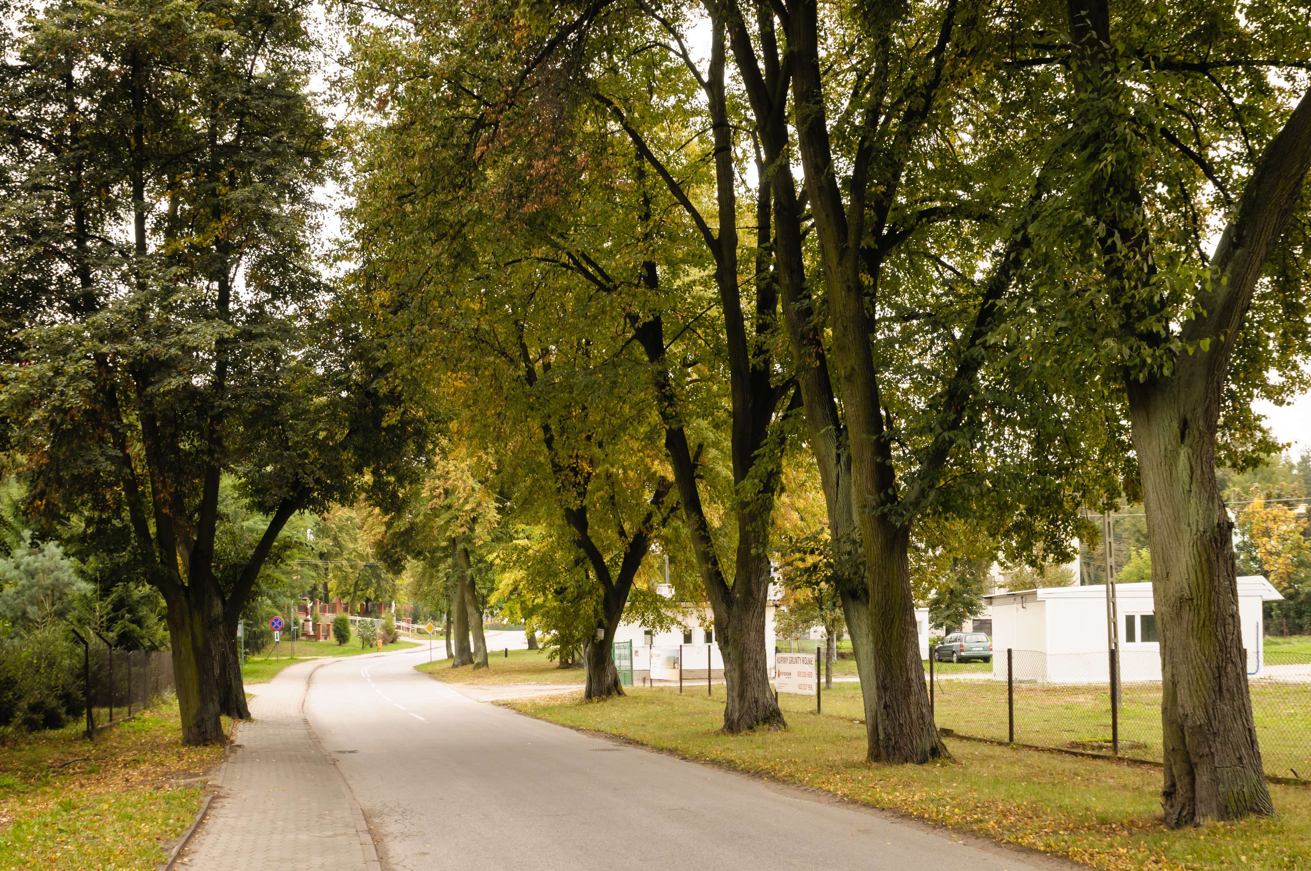 Osuchów, aleje przydrożne, 2 poł. XIX